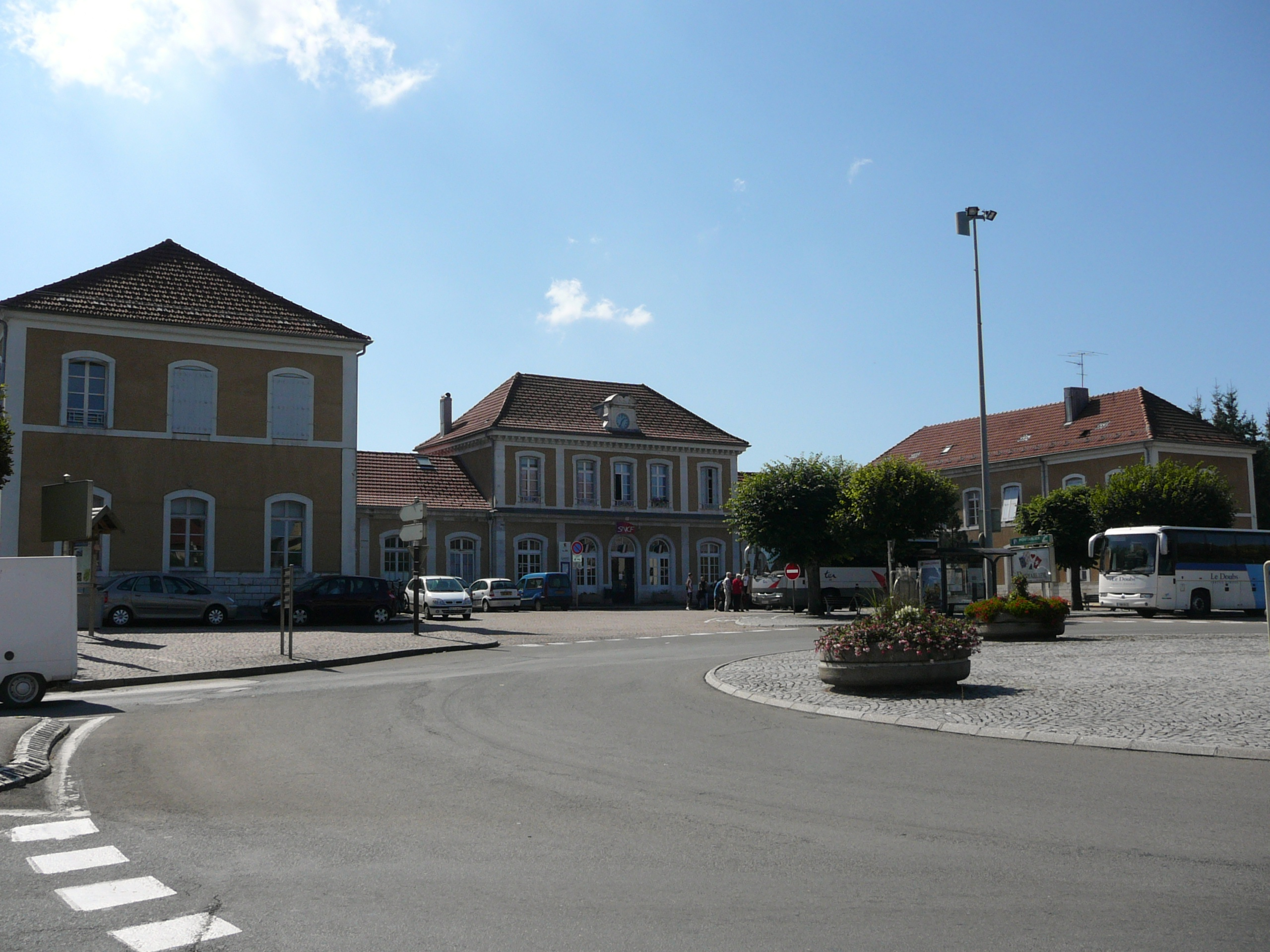 Gare de Pontarlier côté cour